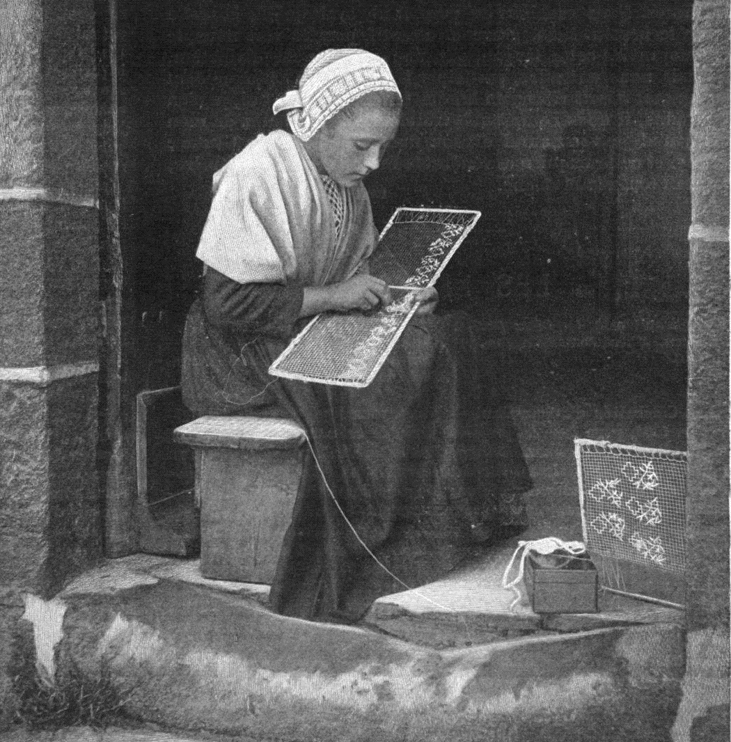 Une brodeuse à Douarnenez ves 1905 (Gustave Geffroy, La Bretagne, article paru dans la "Revue universelle" n°125, 1905